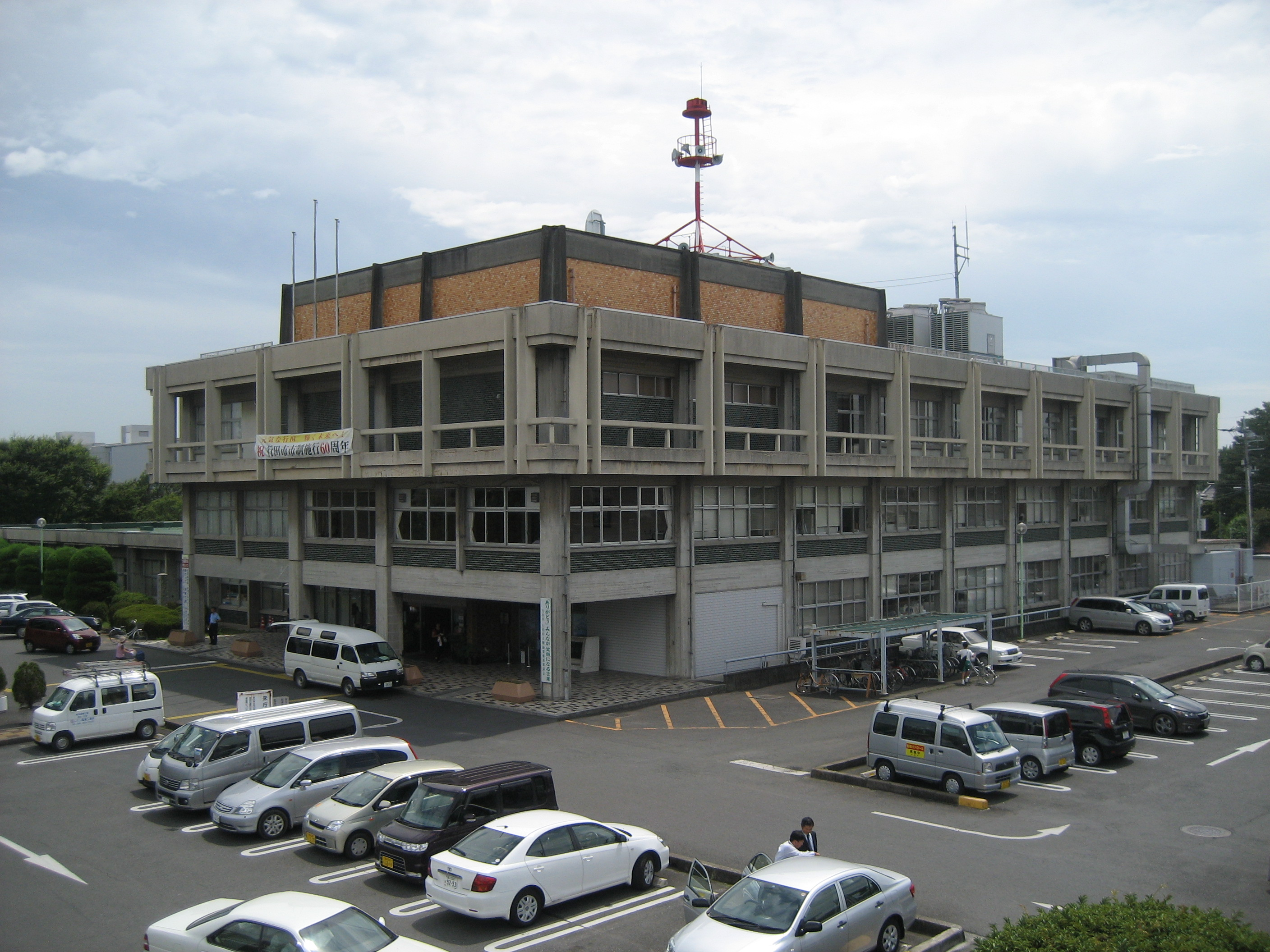 行田市役所庁舎